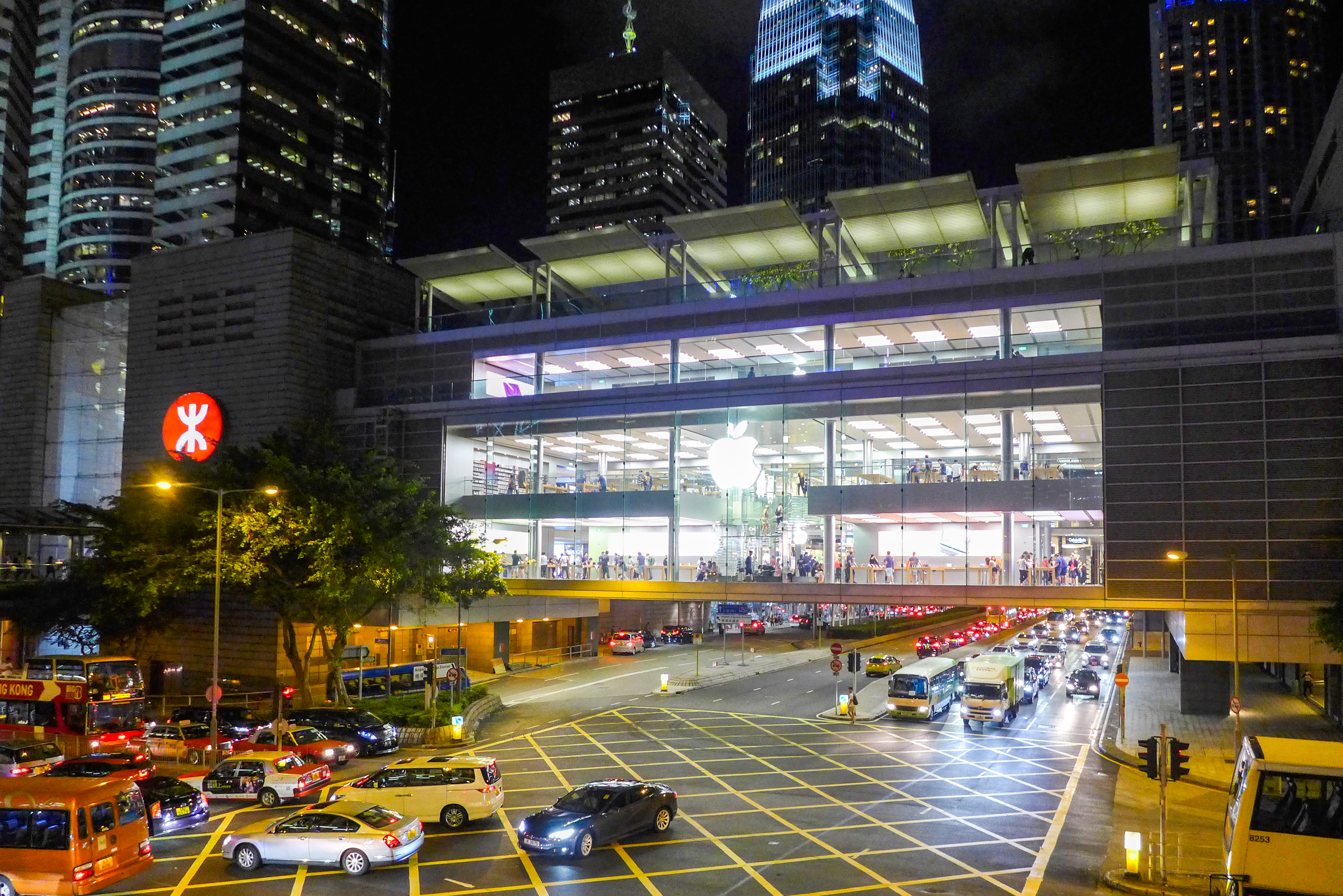 Man Cheung Street Night view